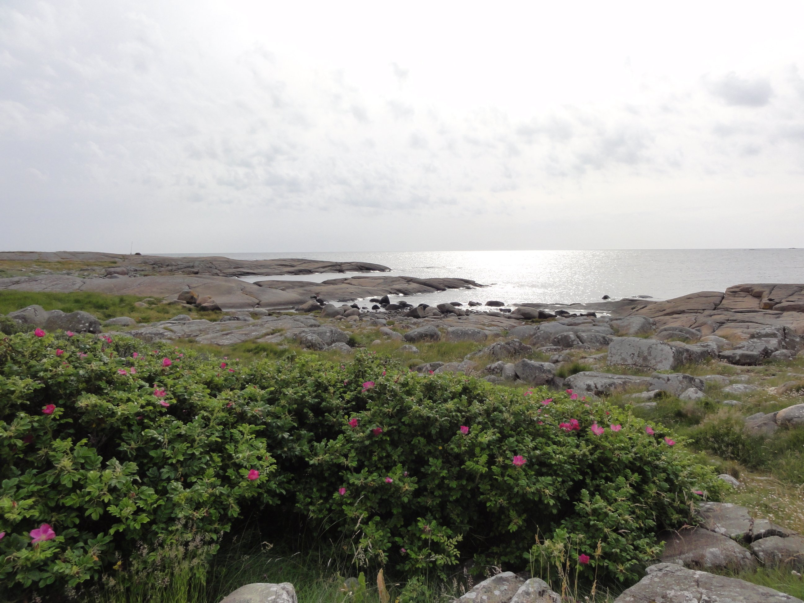 Vy mot väst